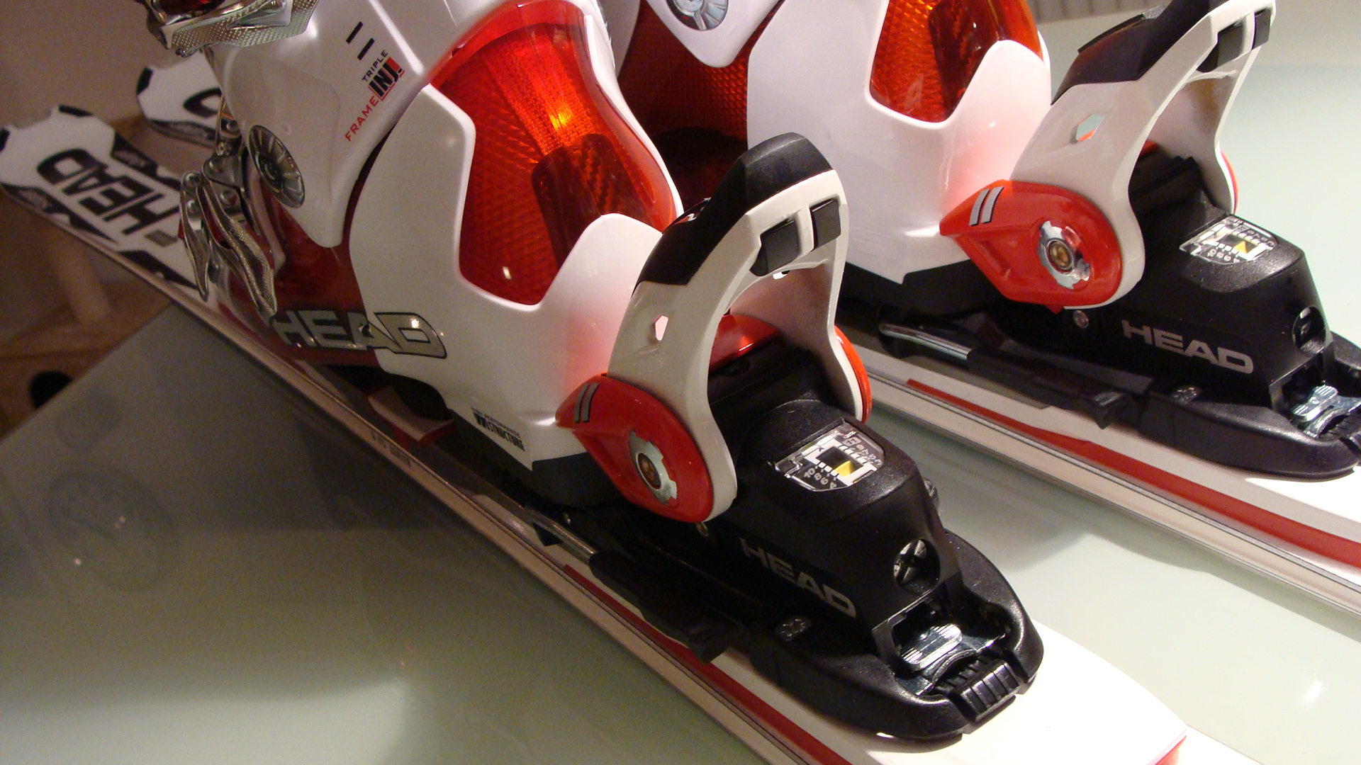 HEAD-Schi-Ausrüstung